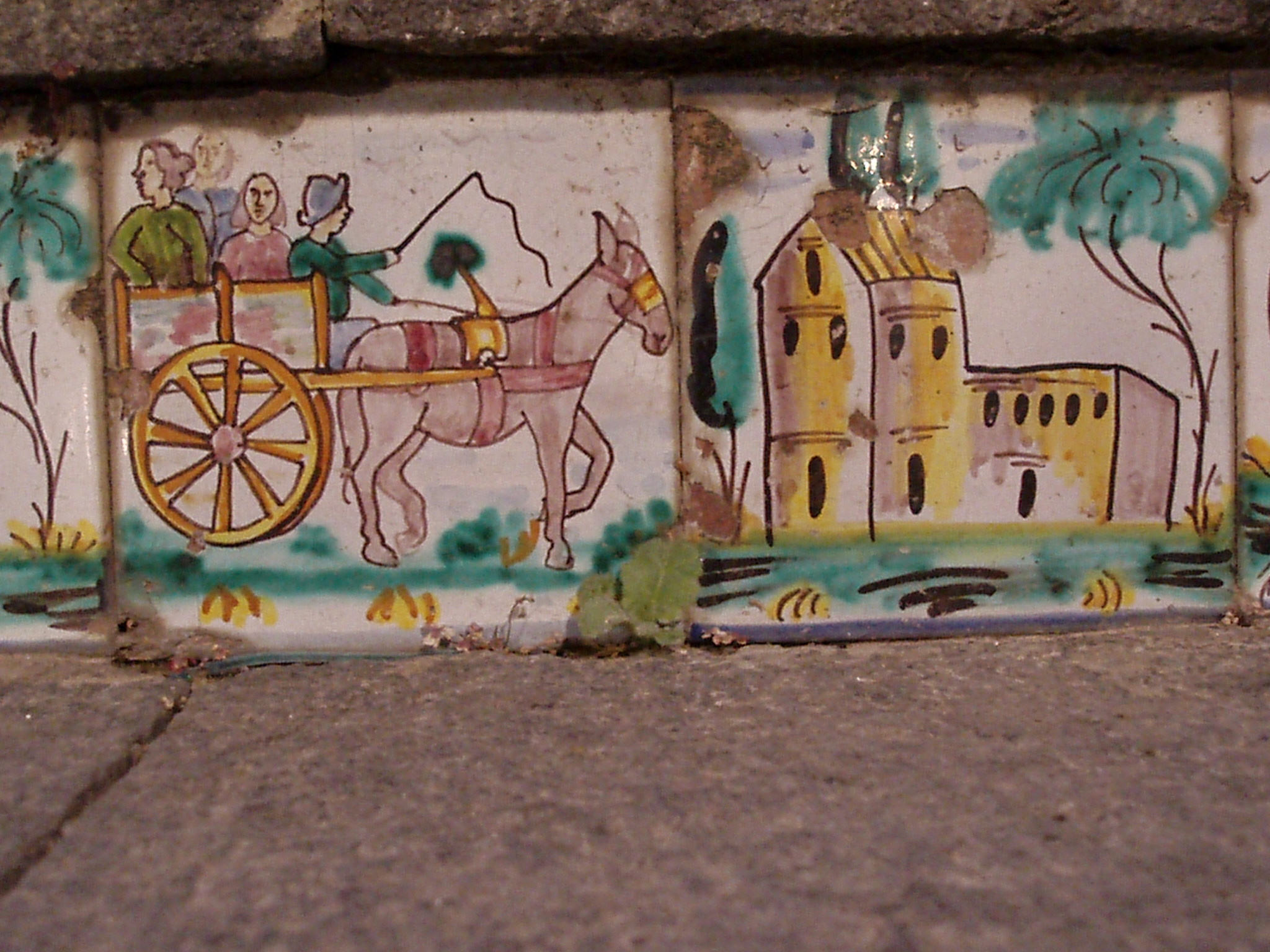 Caltagirone (Sicilia): Santa Maria del Monte famous tiled stair - Detail.